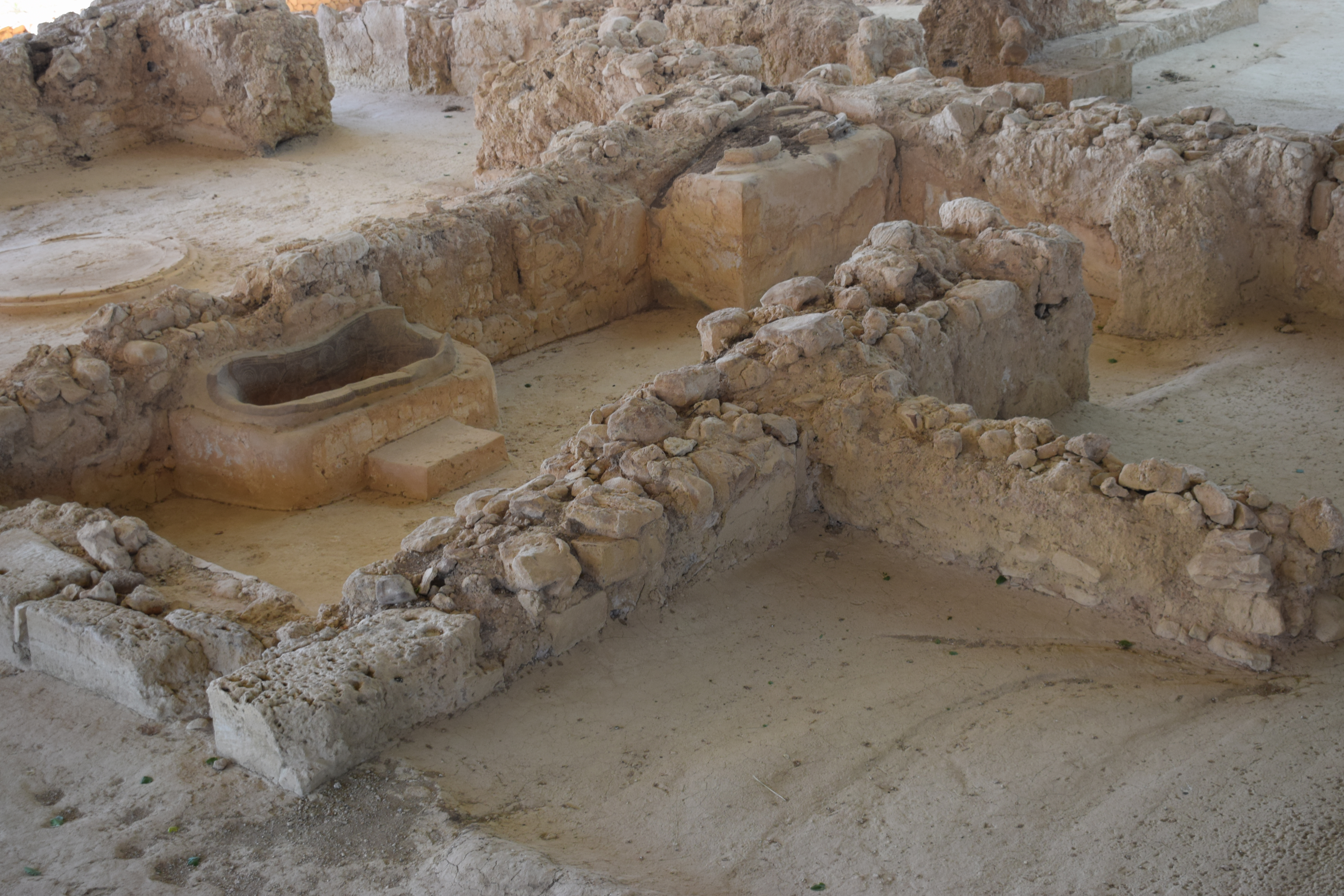 Vue du site archéologique du "palais de Nestor" près de Pylos (Messénie, Grèce).